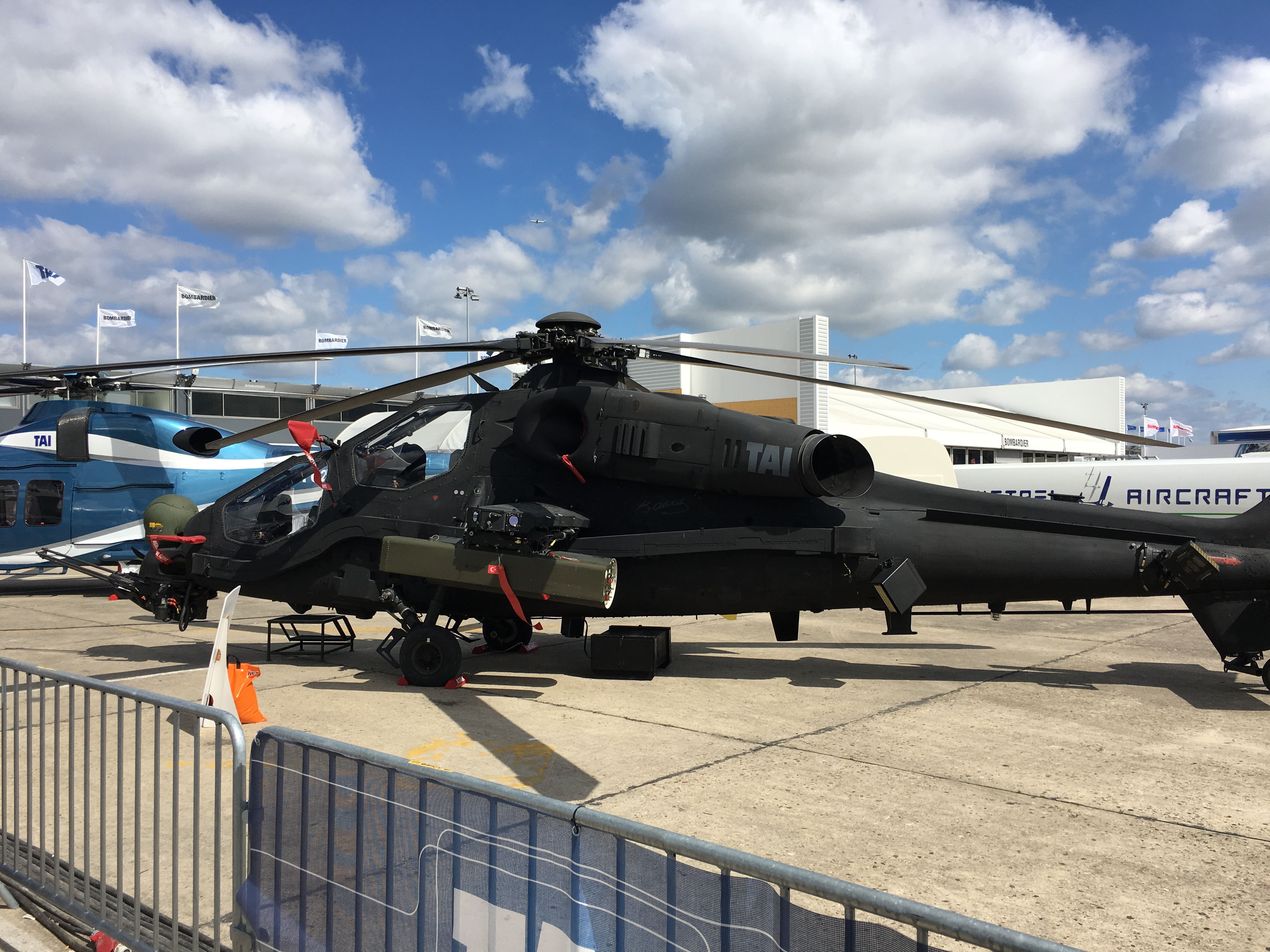 T-129 Atak Salon du Bourget